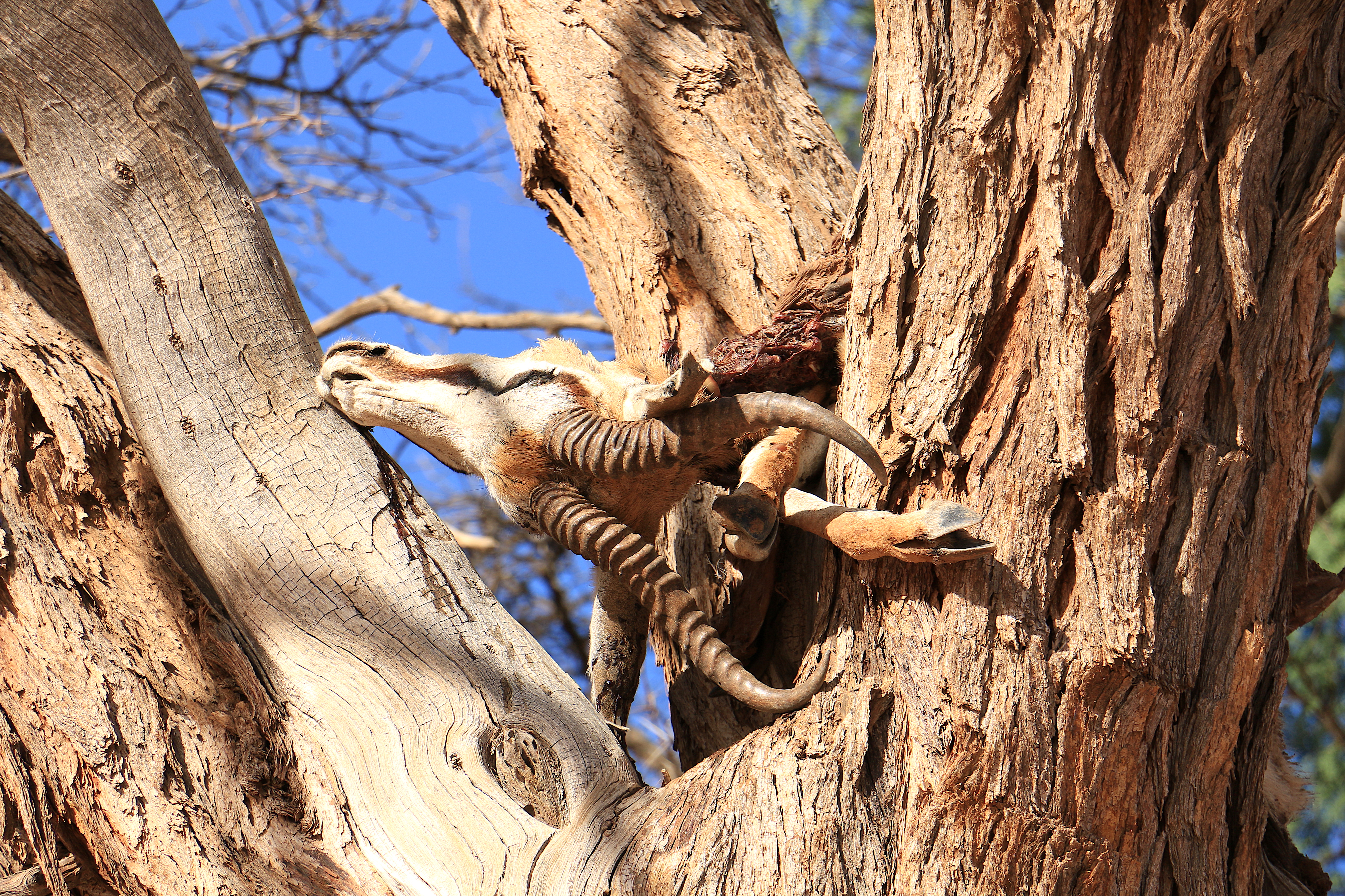 Beute auf einem Kameldornbaum bei Simplon (Namibia)